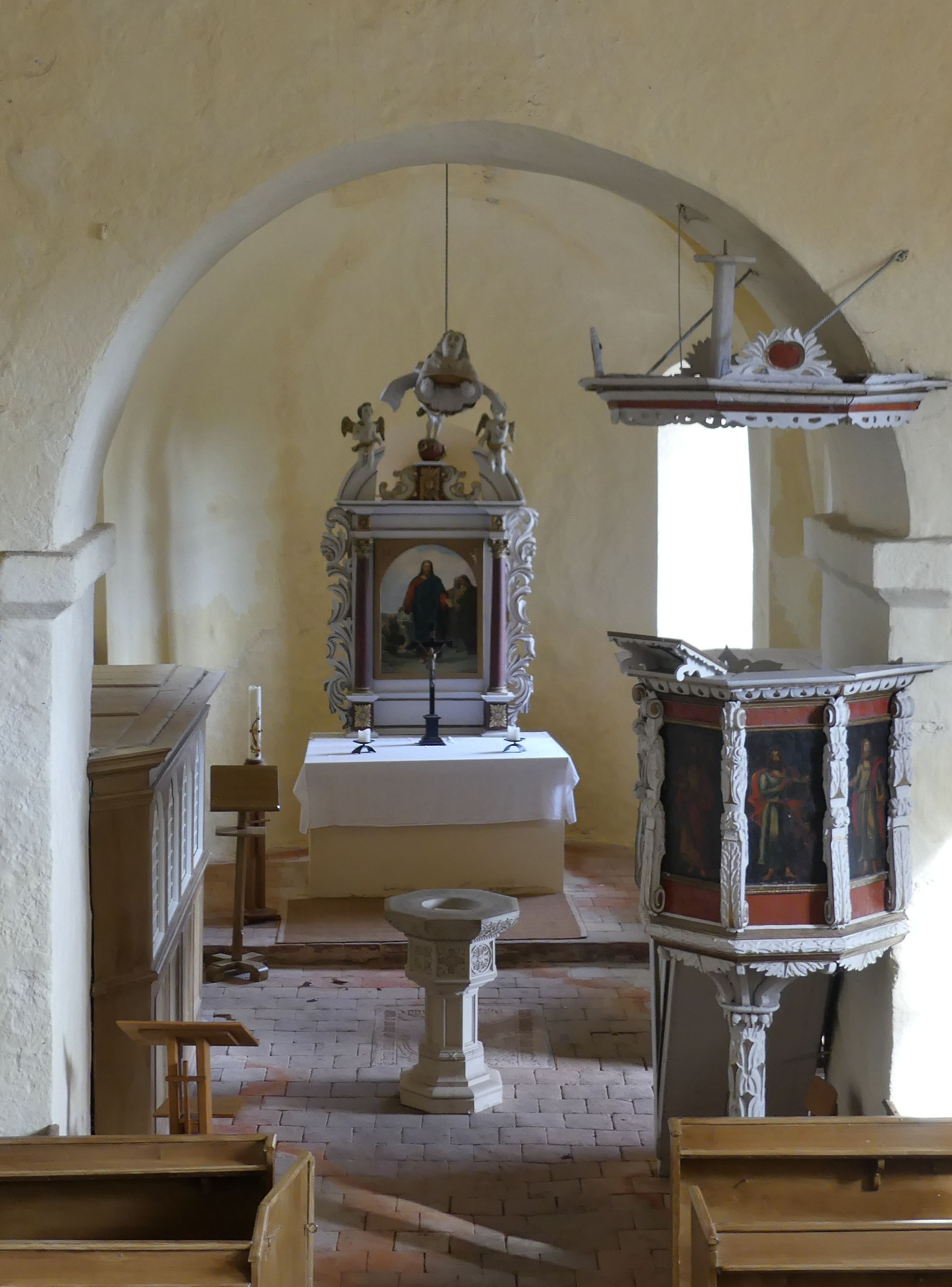 Bescheidene barocke Ausstattung im Inneren der Dorfkirche.